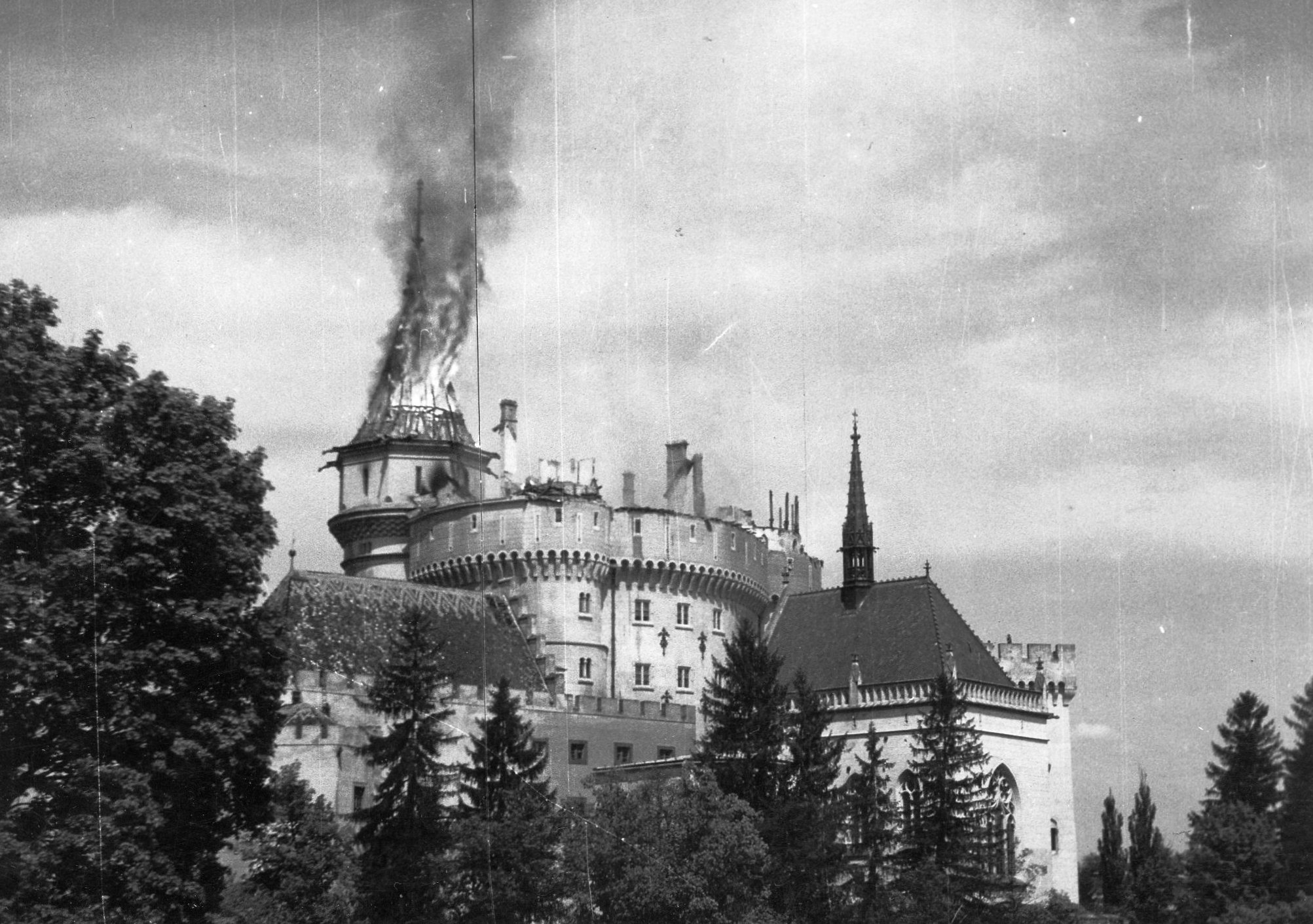 Ničivý požiar v Bojniciach